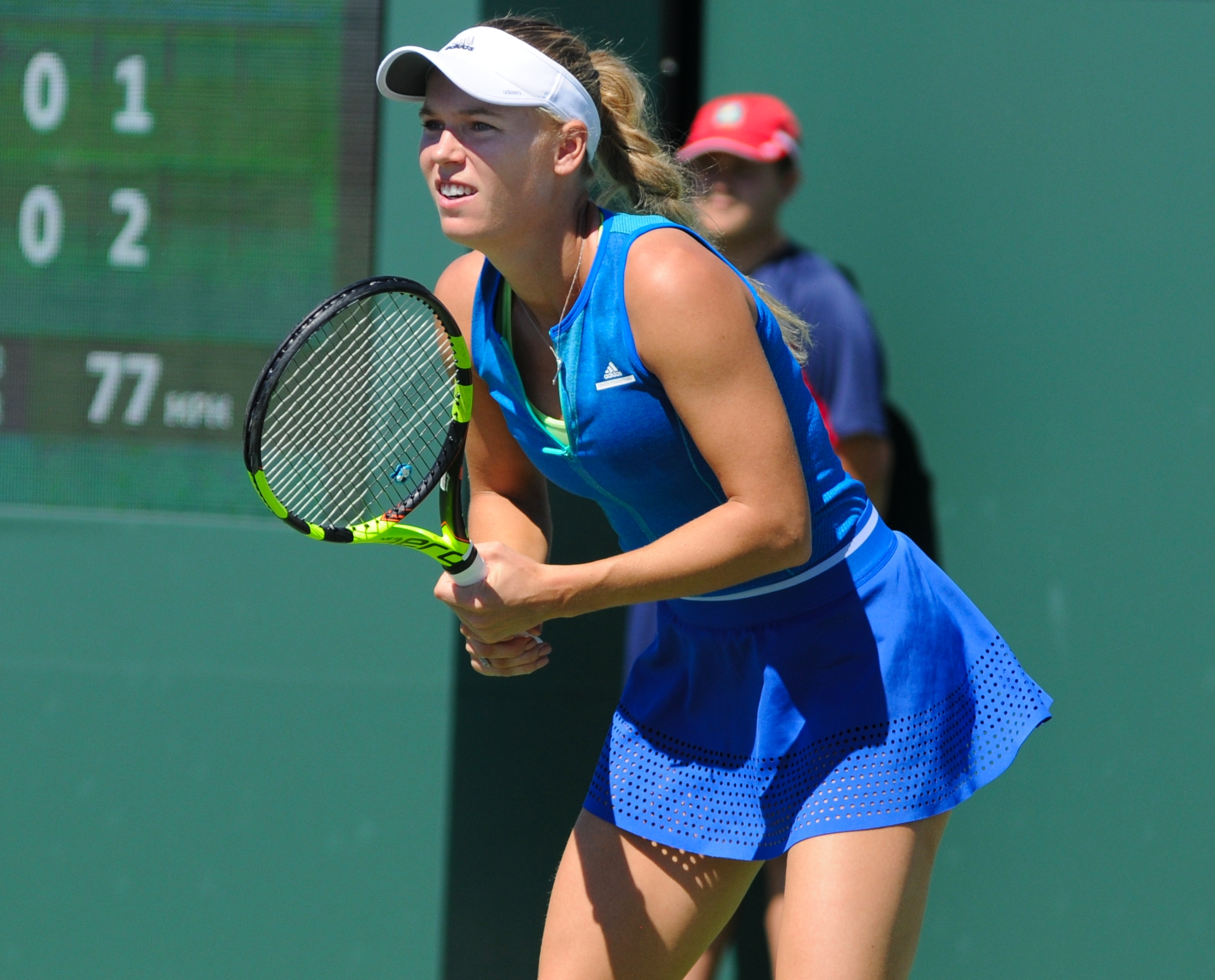 2017 BNP Paribas Open